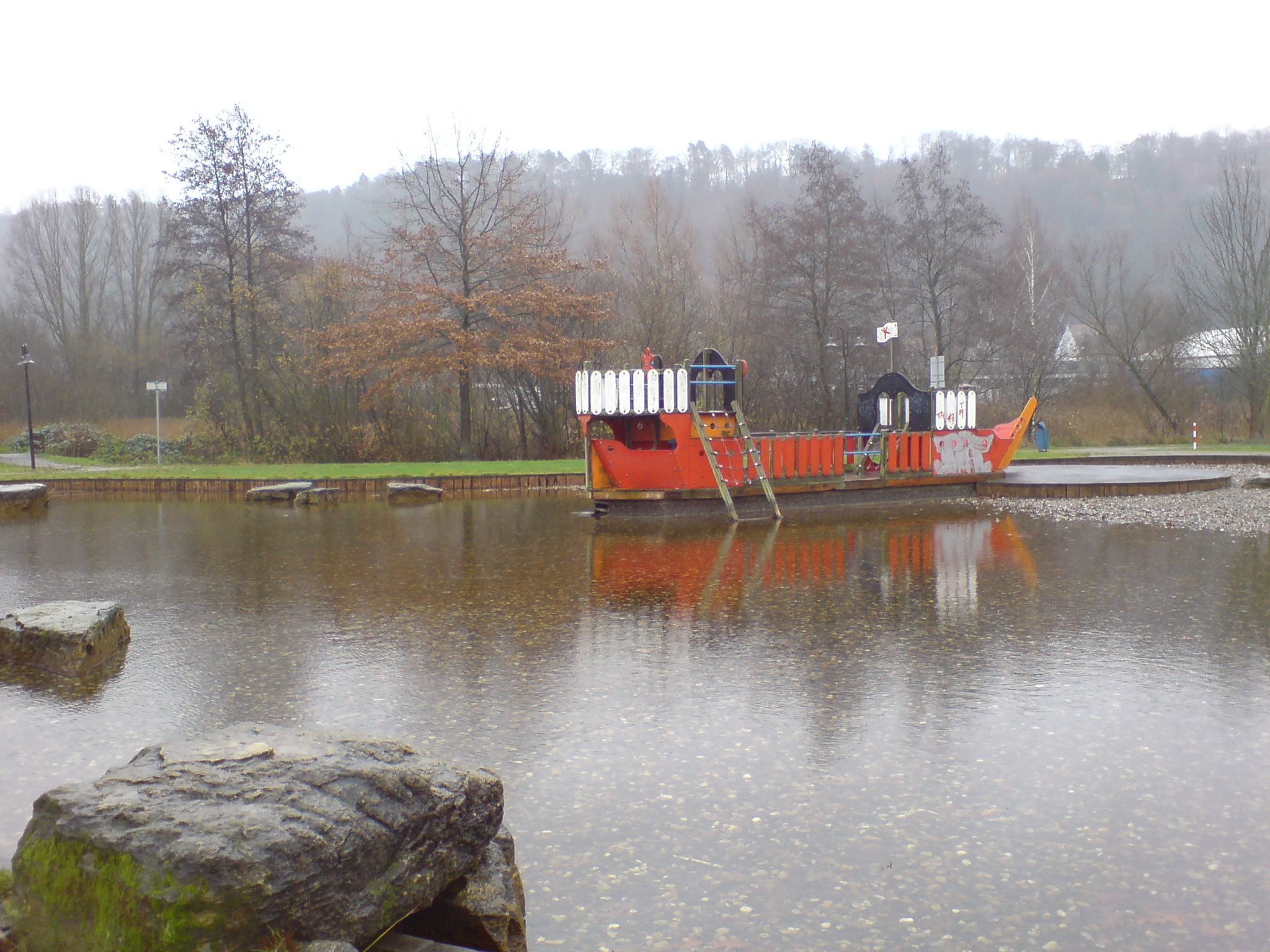 der kleine Weiher mit Piratenschiff im Stadtpark Homburg (Saar)